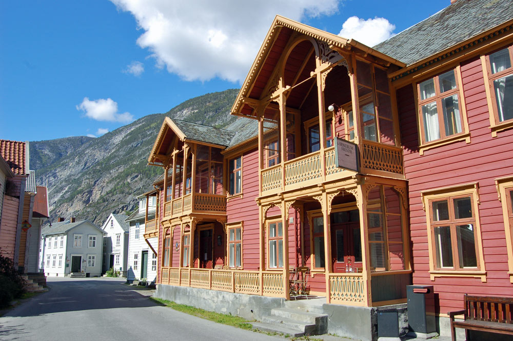 Gamle Lærdalsøyri